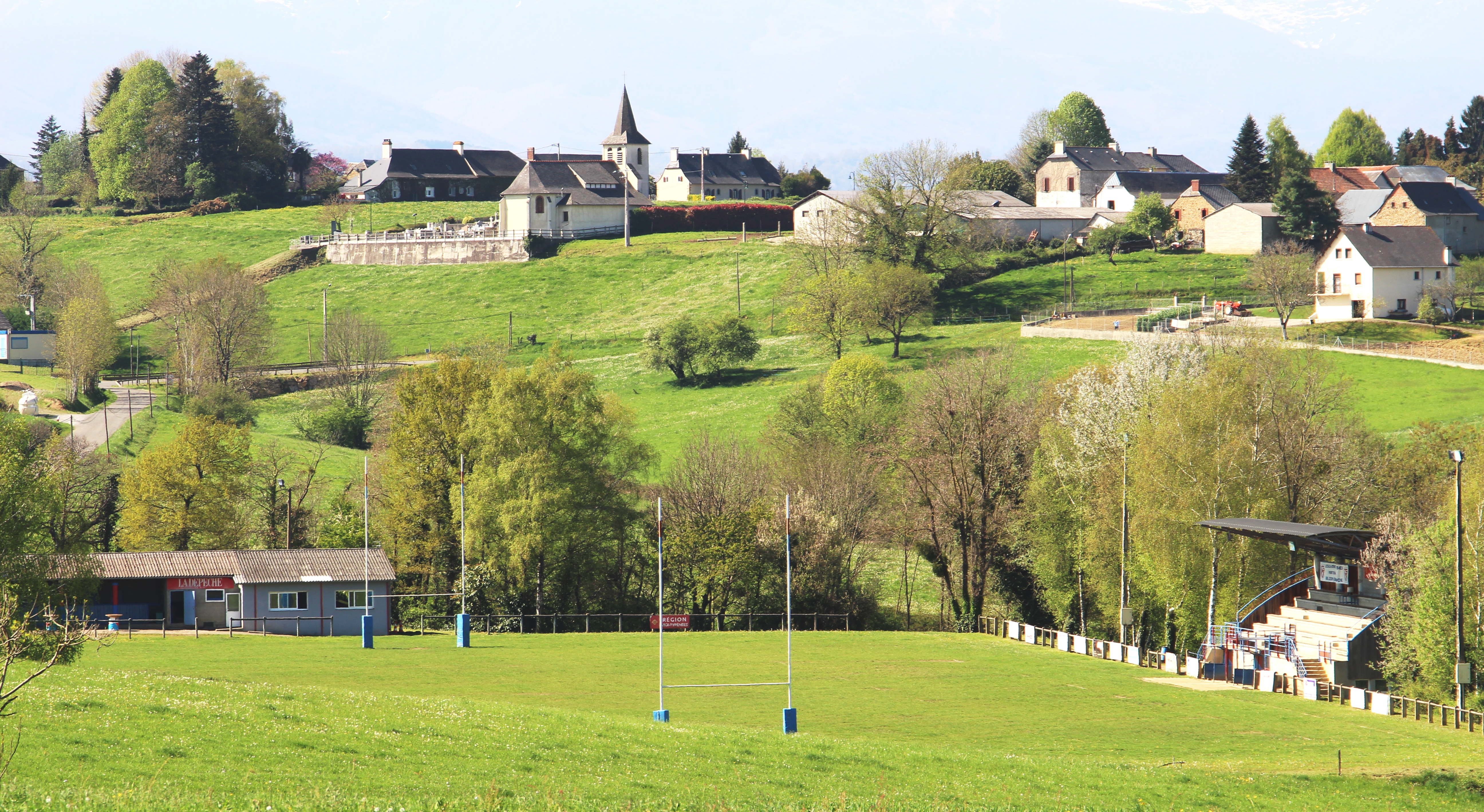 Stade de rugby de Hitte (Hautes-Pyrénées)